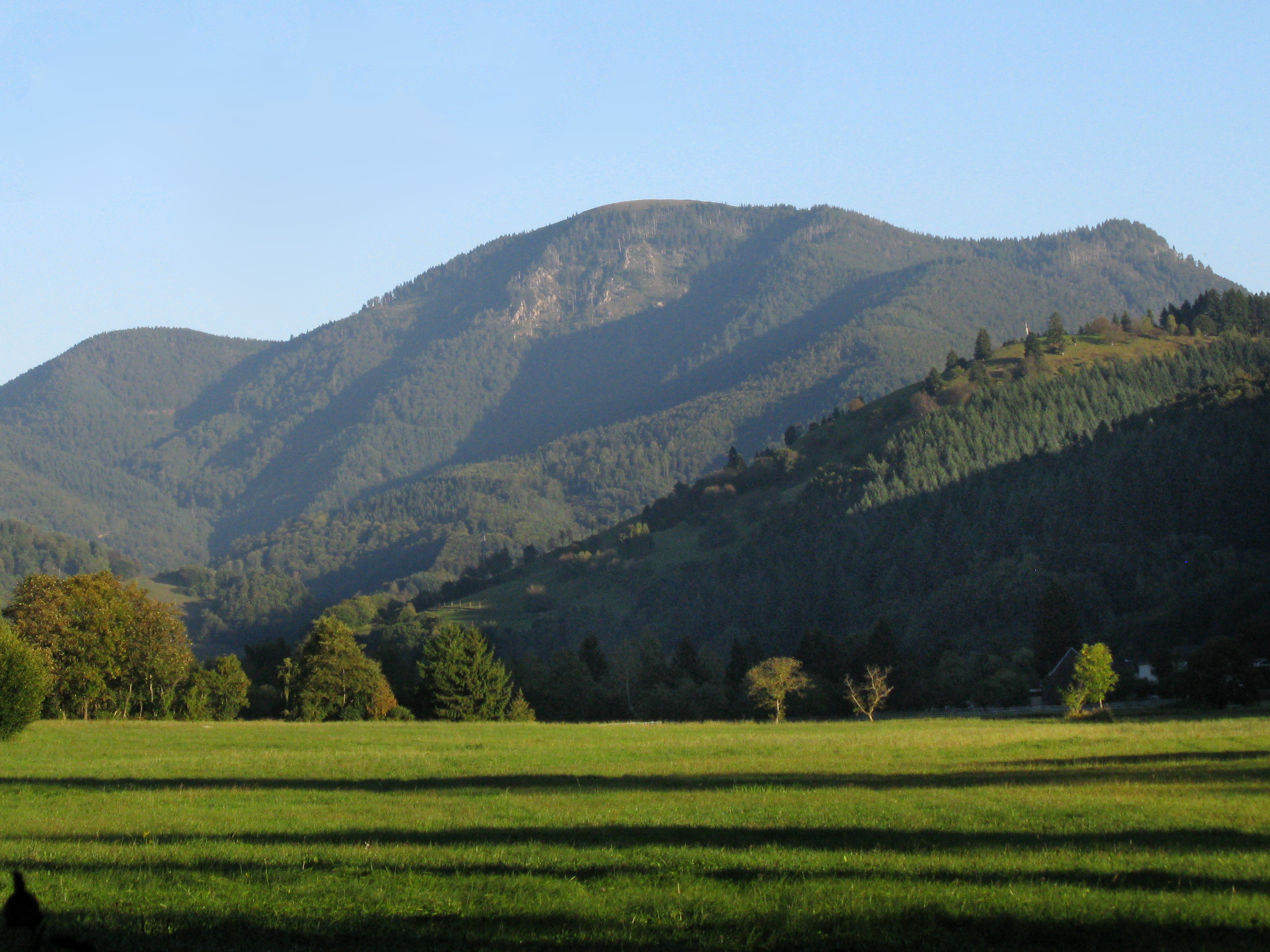 Belchen vom Münstertal, Gemarkung Staufen-Grunern